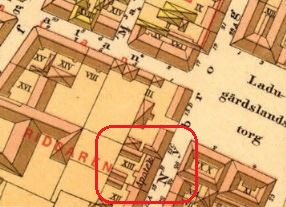 Apoteket Hvita Björnen, Nybrogatan 15B på Lundgrens Stockholmskarta från 1885